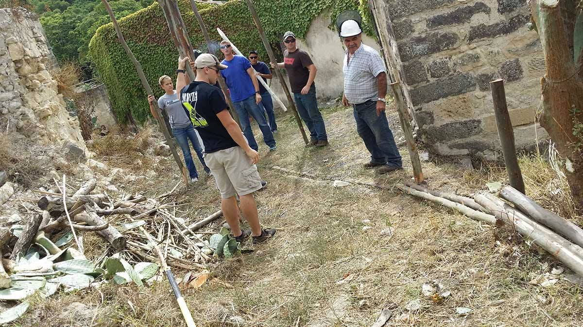 I Marines a Cunziria